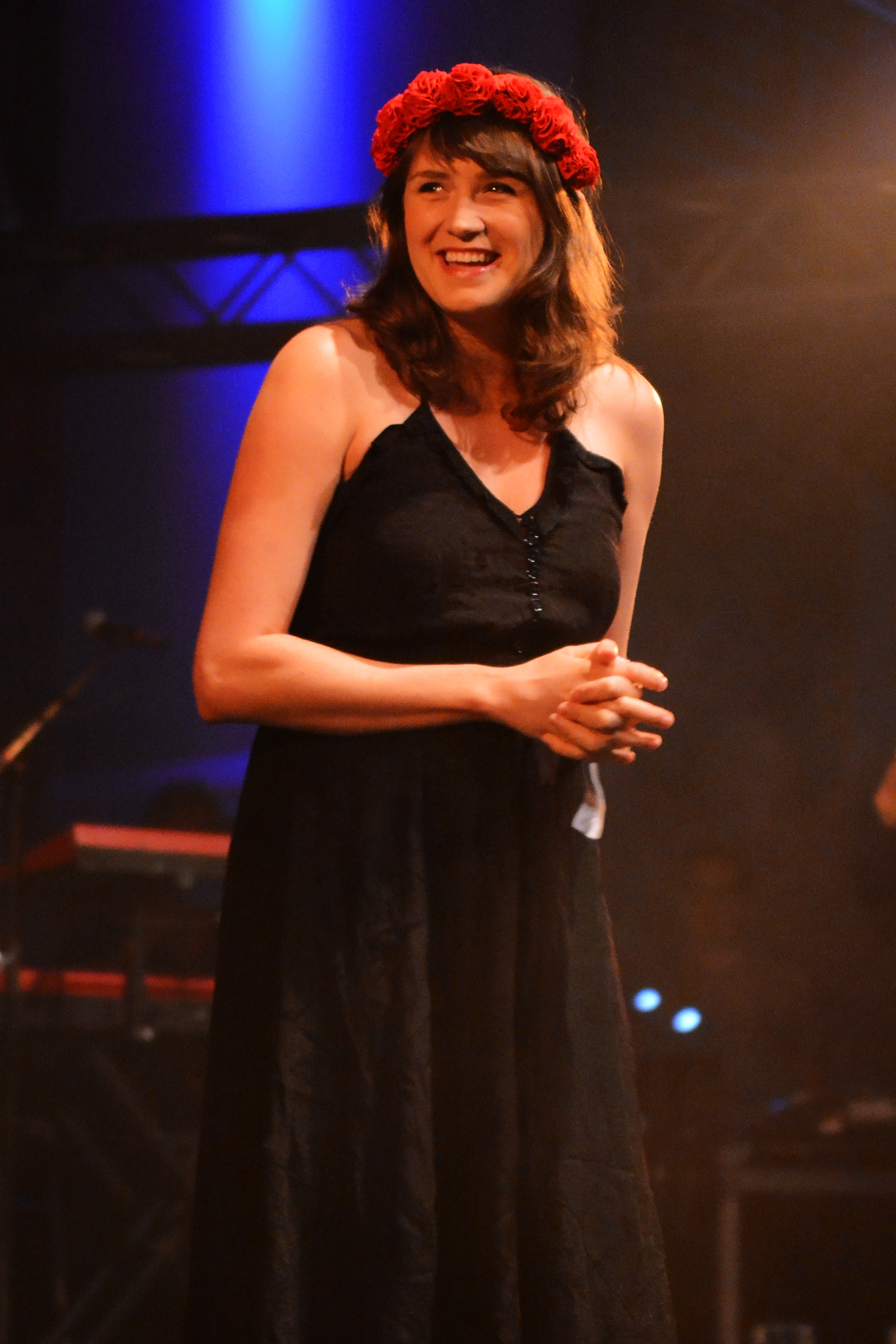 Dear Reader beim Traumzeit-Festival 2014